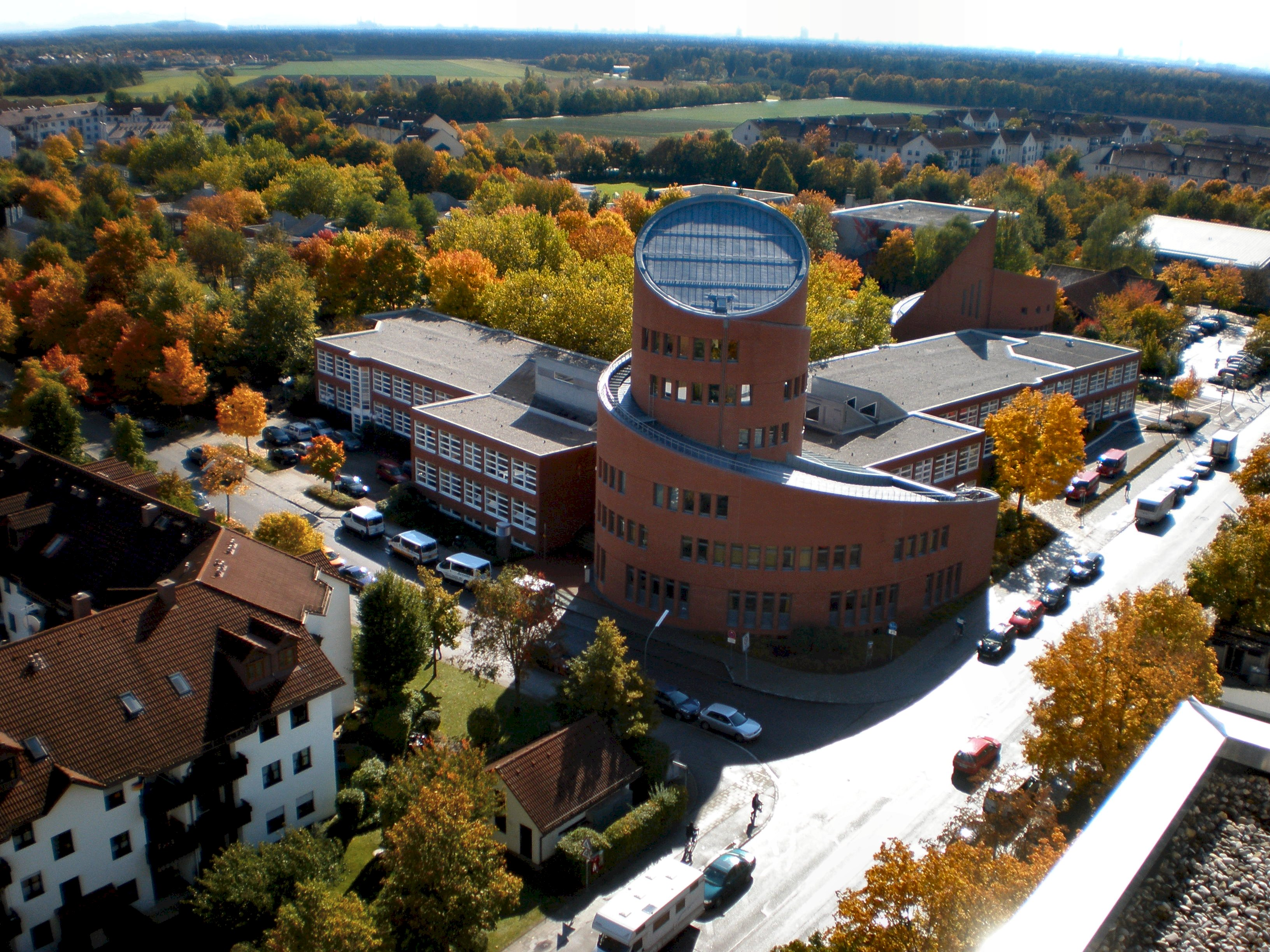 Sehbehindertenzentrum, dahinter Michael-Ende-GS, Kindergarten, Hort